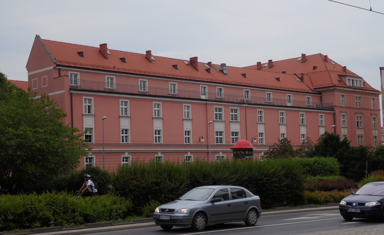 ZABYTEK.